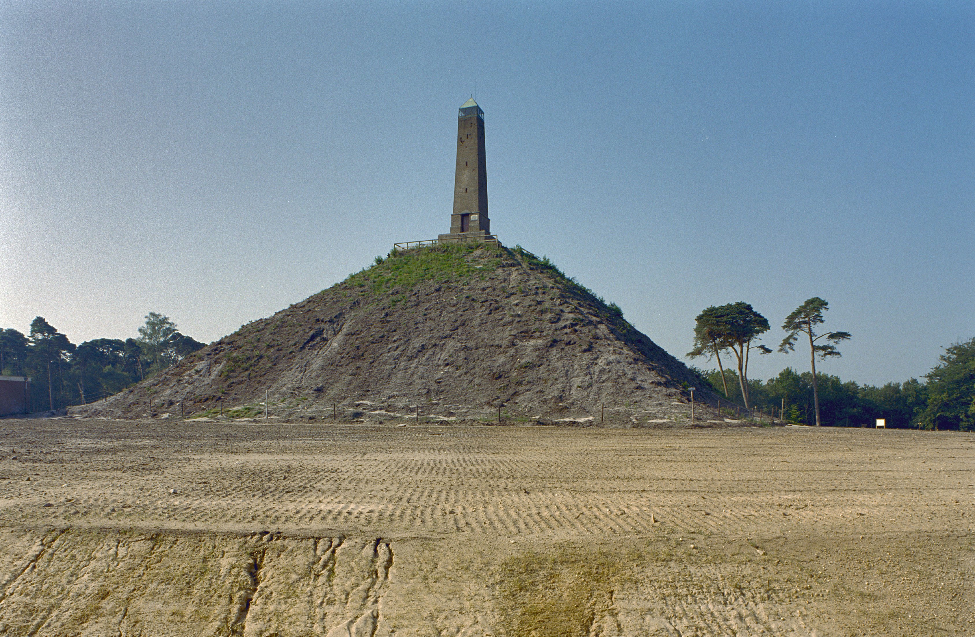 Piramide Van Austerlitz: Overzicht piramide met stenen obelisk (opmerking: Gefotografeerd voor het Monumenten boek, Karel Loeff)